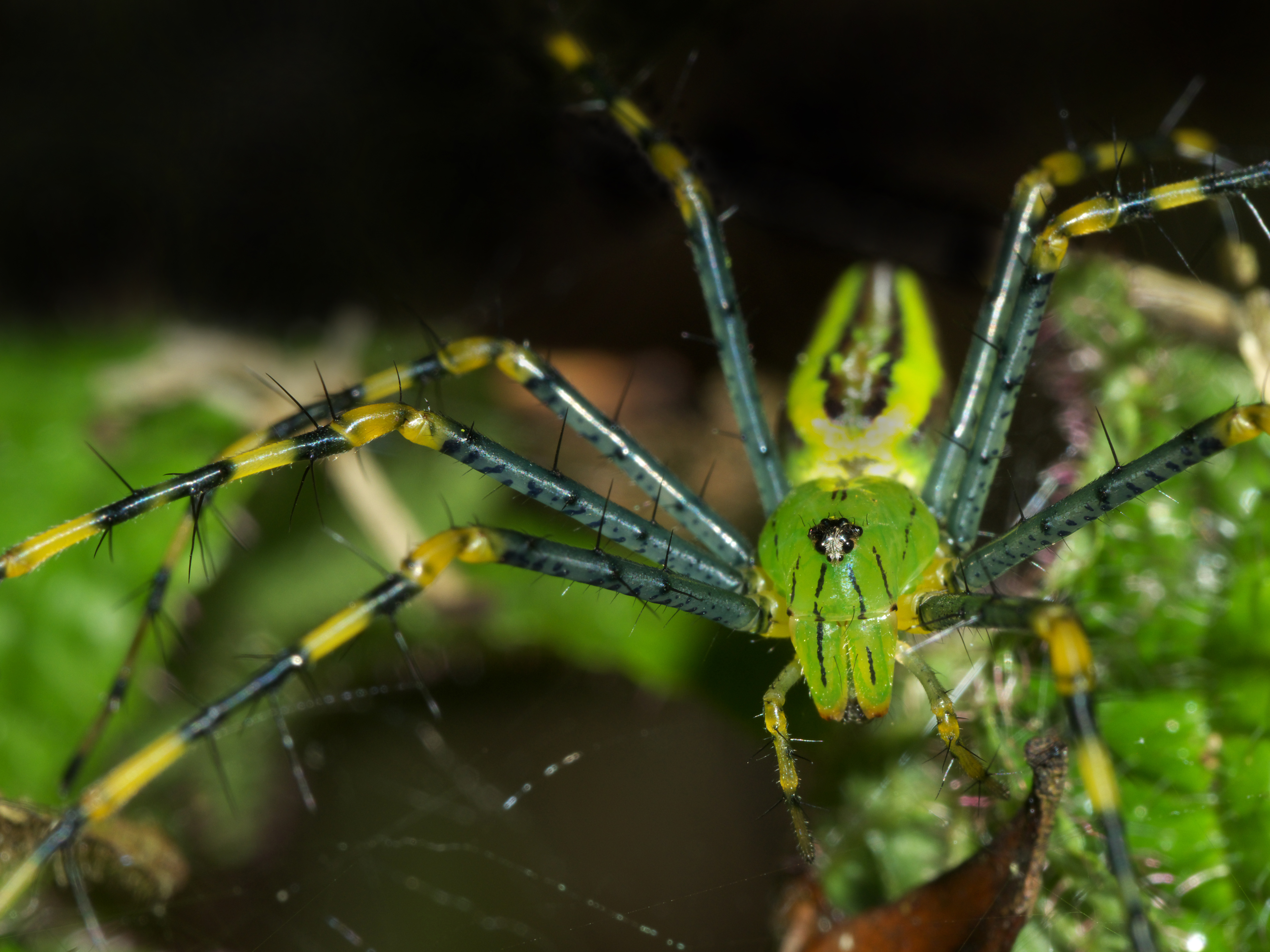 Peucetia madagascariensis in Madagaskar